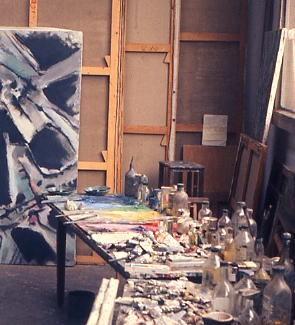 L'atelier du peintre français Alfred Manessier en 1969, à Émancé, Yvelines (France).